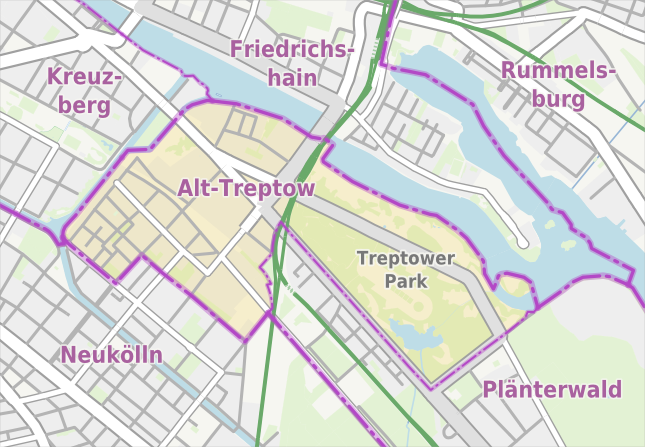 Übersichtskarte der Straßen und Ortslagen in Berlin-Alt-Treptow